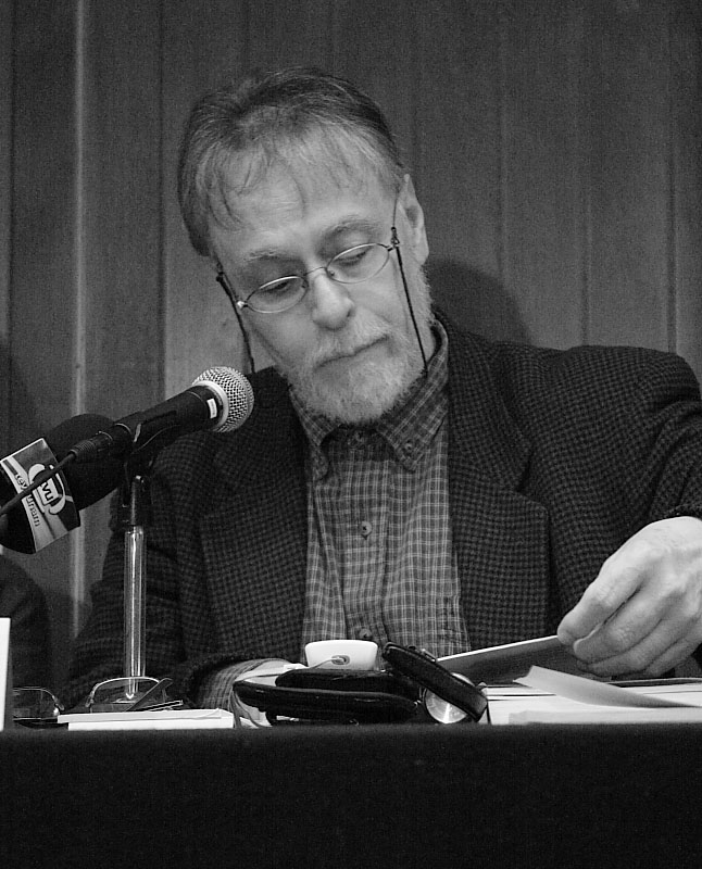 El poeta mexicano David Huerta en lectura de poesía